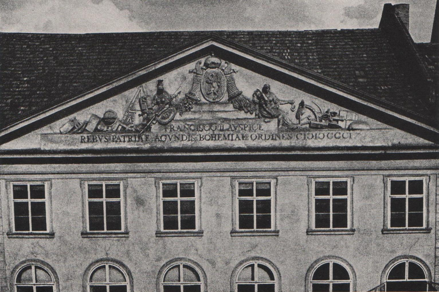 Štít Thunovského paláce v době, kdy ještě sloužil zemskému sněmu Království českého (před 1918). Nápis zní: "Francisco II. auspice rebus patriae agundis Bohemiae ordines MDCCCI"